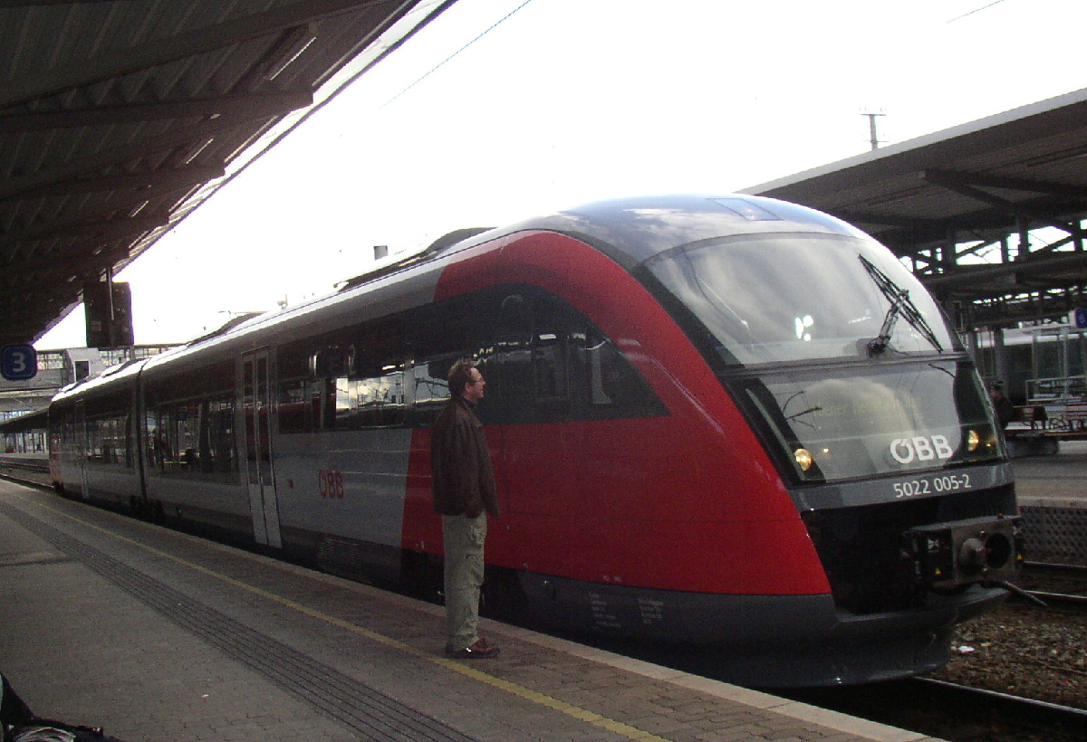 de: ÖBB 5022 005-2 Diesel-Nahverkehrstriebwagenzug in Wiener Neustadt Hbf en: ÖBB class 5022 diesel commuter train, seen at Wiener Neustadt main station